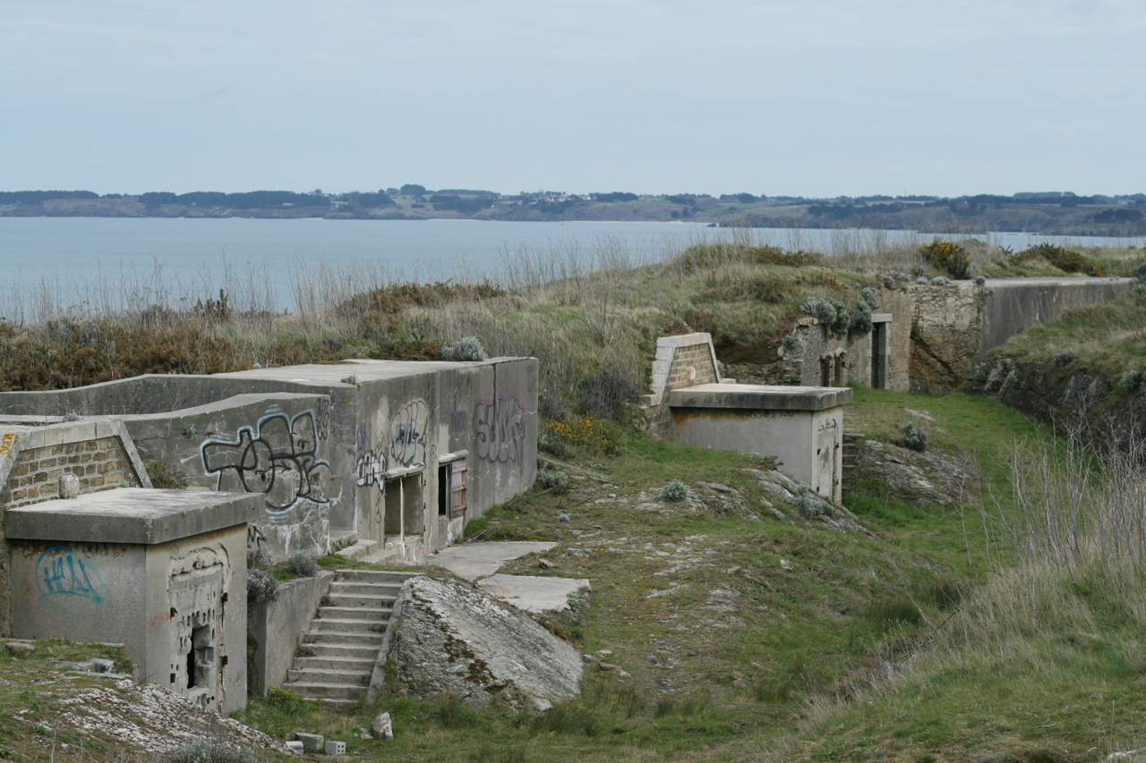 Taillefer